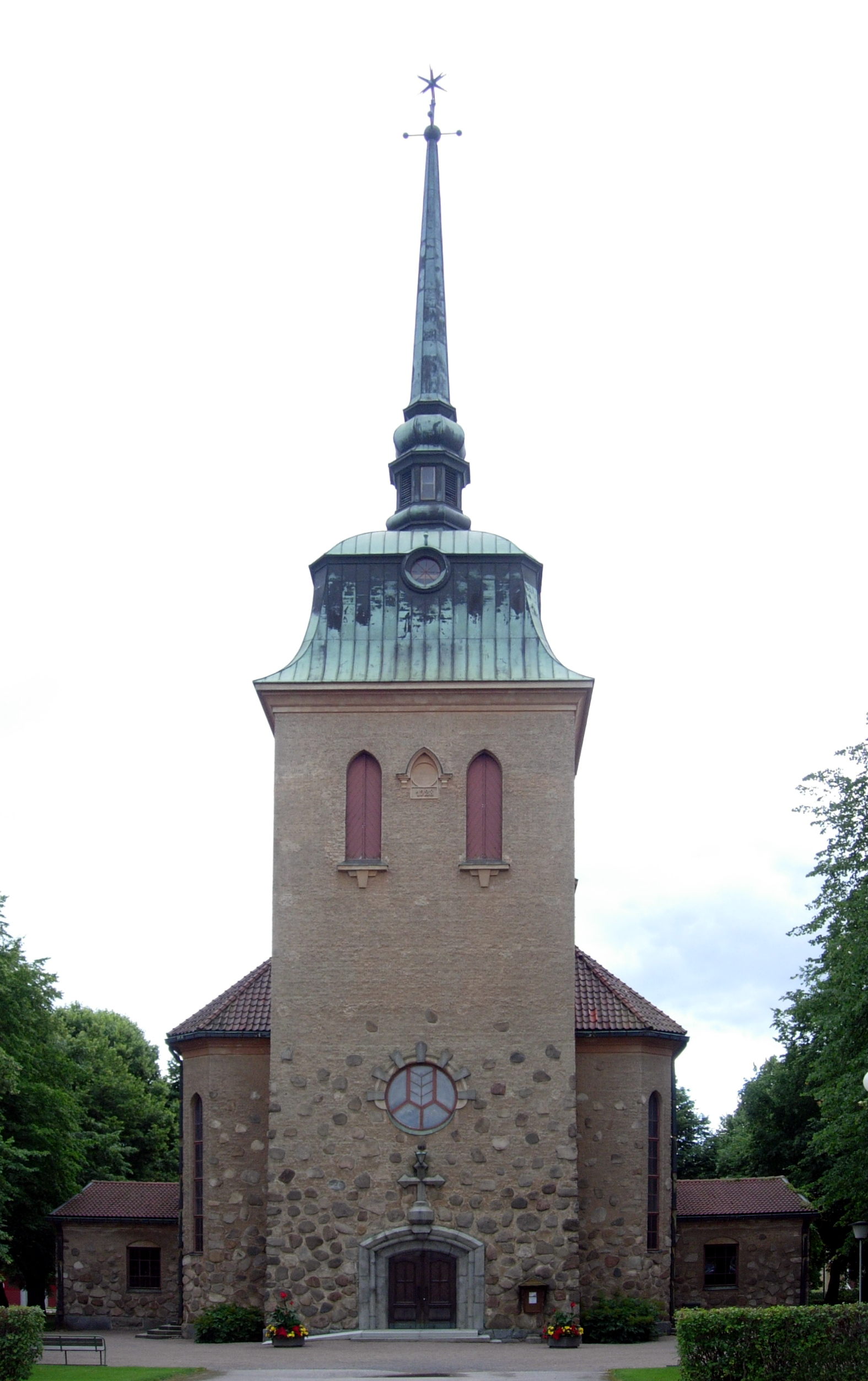 Mäntän kirkko. Kirkon on suunnitellut W.G. Palmqvist ja se on valmistunut 1928.